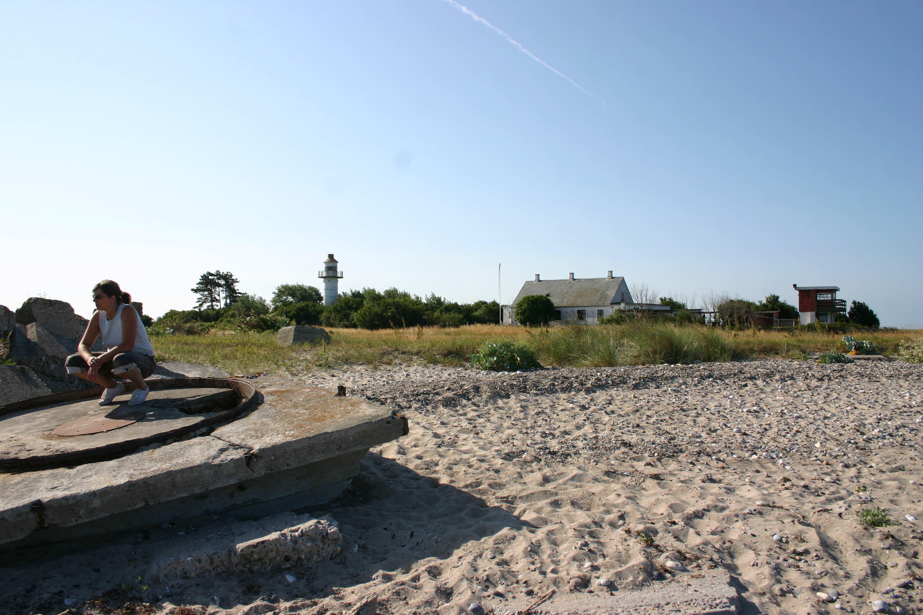 Resterne af det gamle fyrtårn på Albuen. Fyret måtte nedrives, da havet gnavede sig for tæt ind på det. I baggrunden det nuværende fyrtårn, Lodshuset og udkigget, der holdt øje med trafikken i Langelandsbæltet især under den kolde krig.